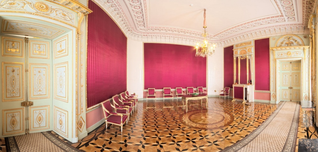 «Золотые комнаты». Стены обиты натуральным шелком, как и мебель. Имеется покрытие сусальным золотом.